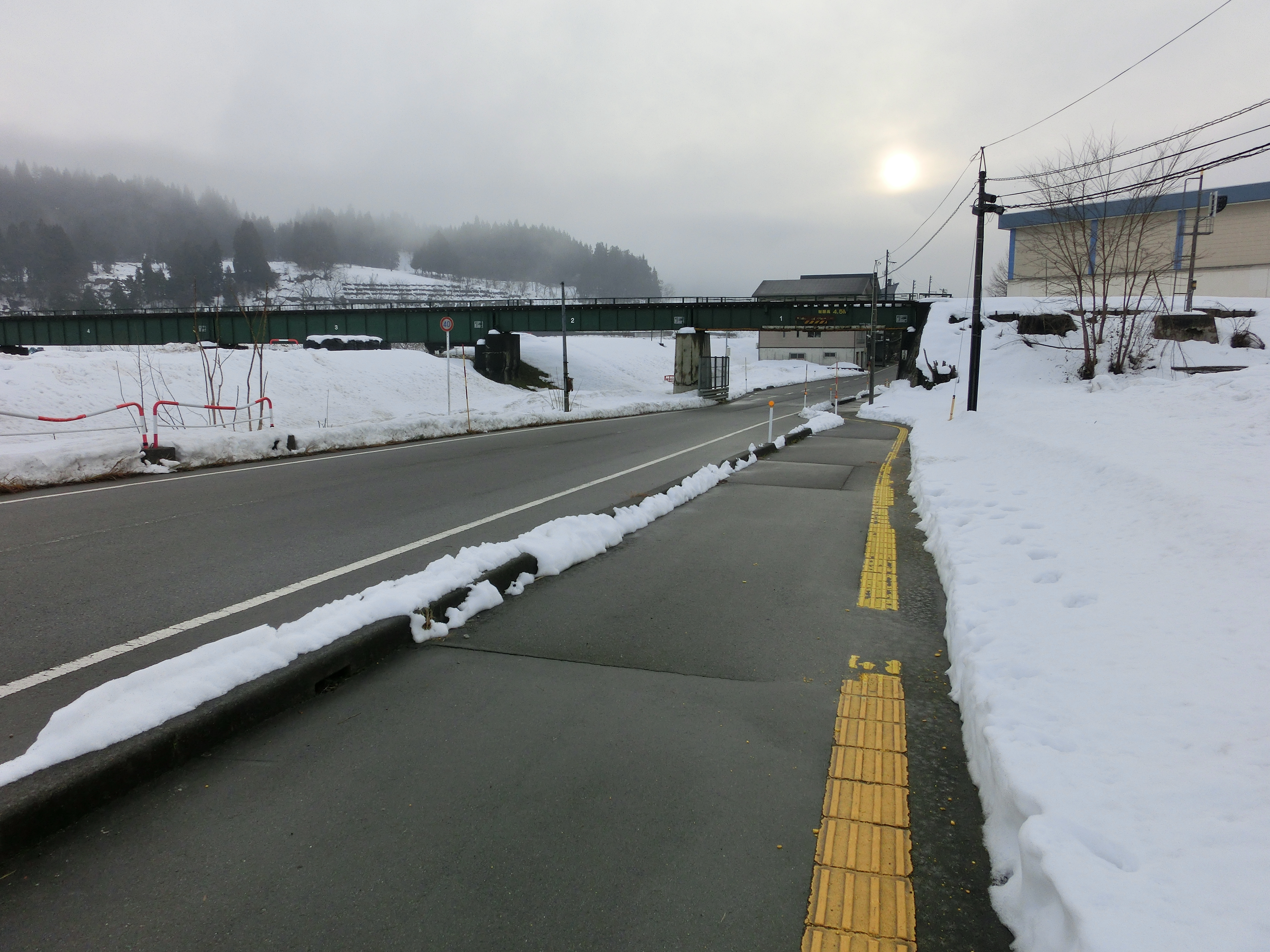 この画像は2017年12月24日早朝、新潟県長岡市西川口にて撮影された飯山線魚野川橋梁西詰（新潟県道557号西川口和南津線を下に通している）の写真。